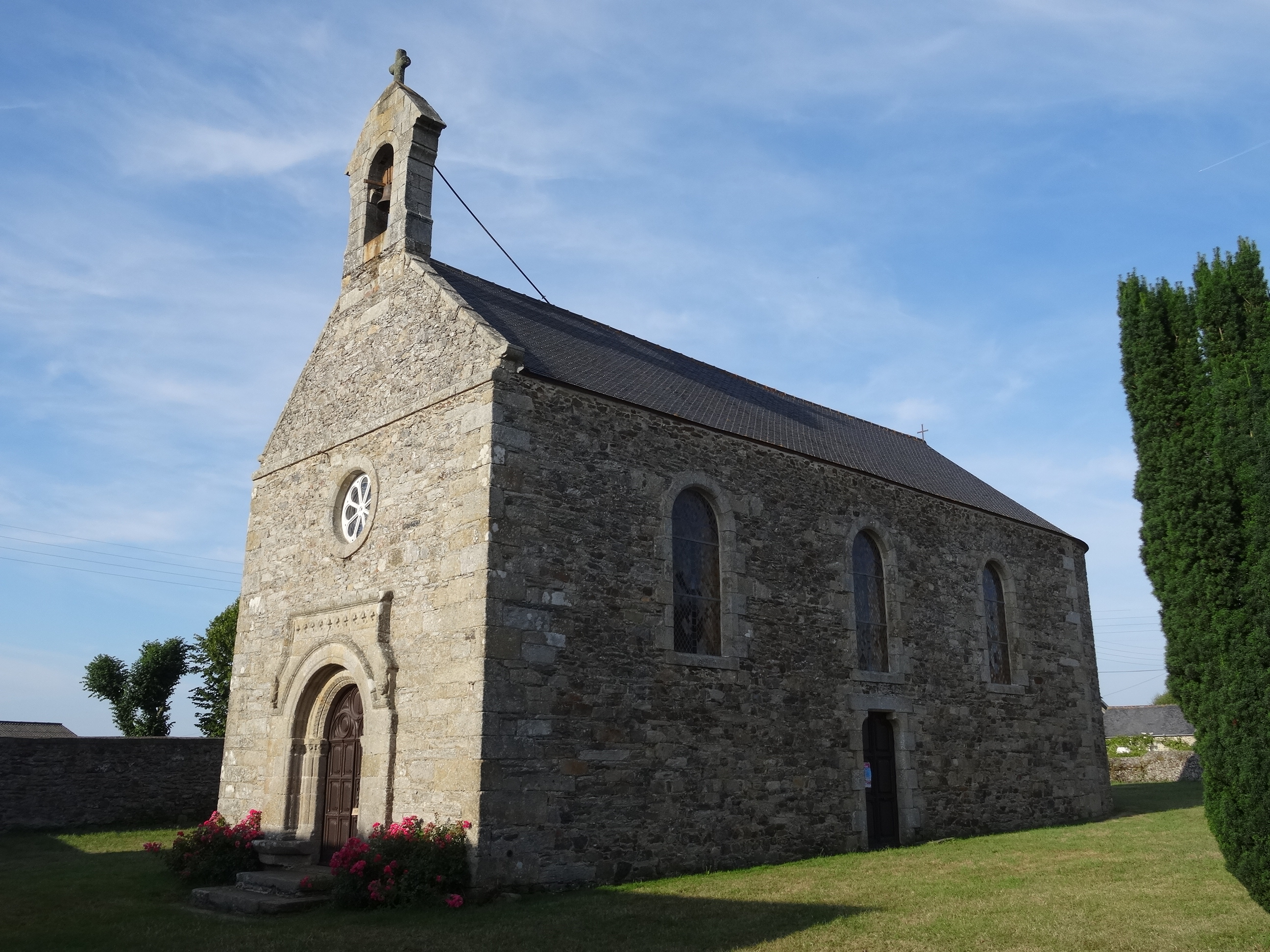 Chapelle de Saint-Germain de la Mer (Matignon, Côtes-d'Armor, région Bretagne).